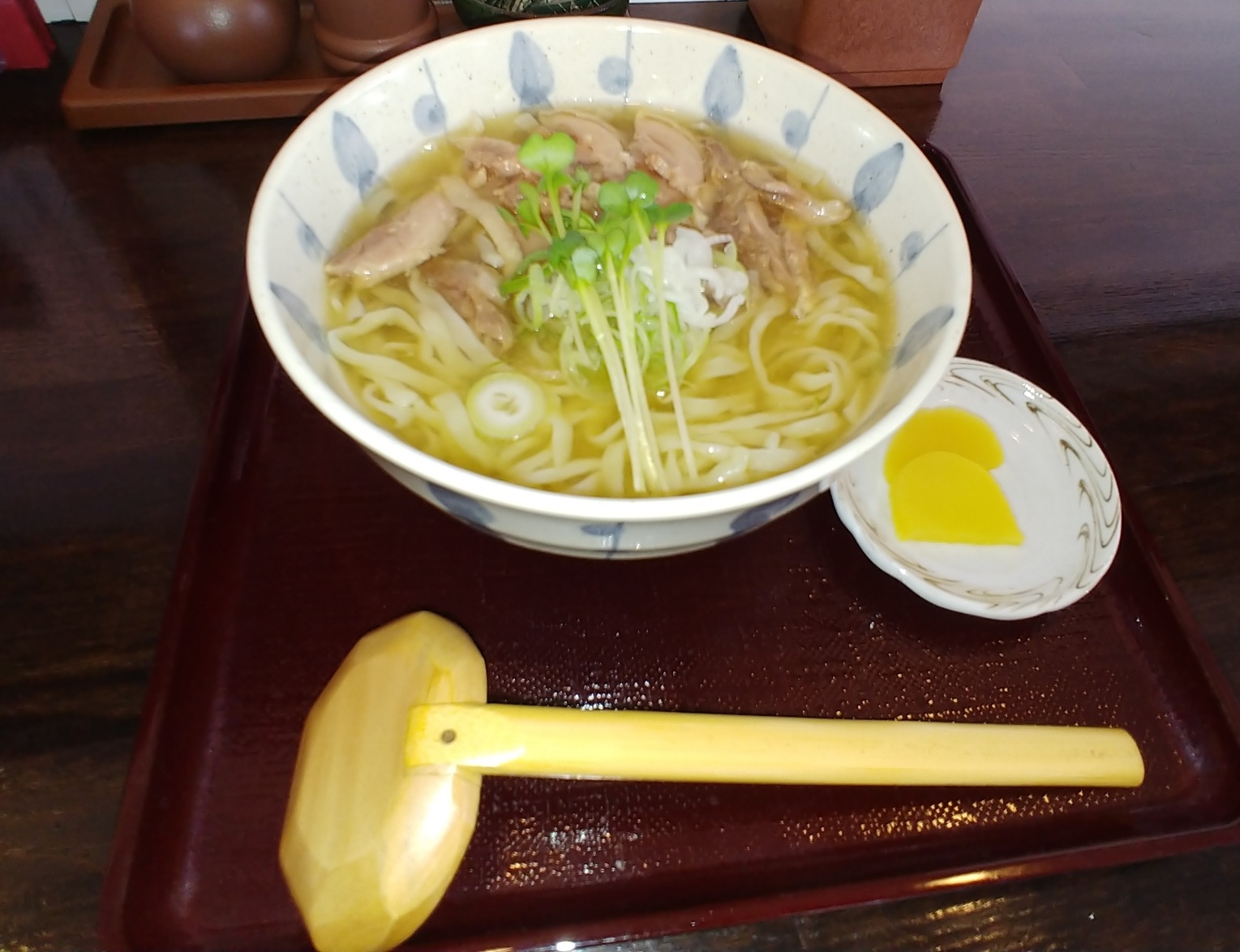 山形県のおそば屋さんで提供される鶏中華です。 鶏中華はジャンルとしては中華そばになりますが、出汁などはそばと同じく鰹ぶしがベースになります。